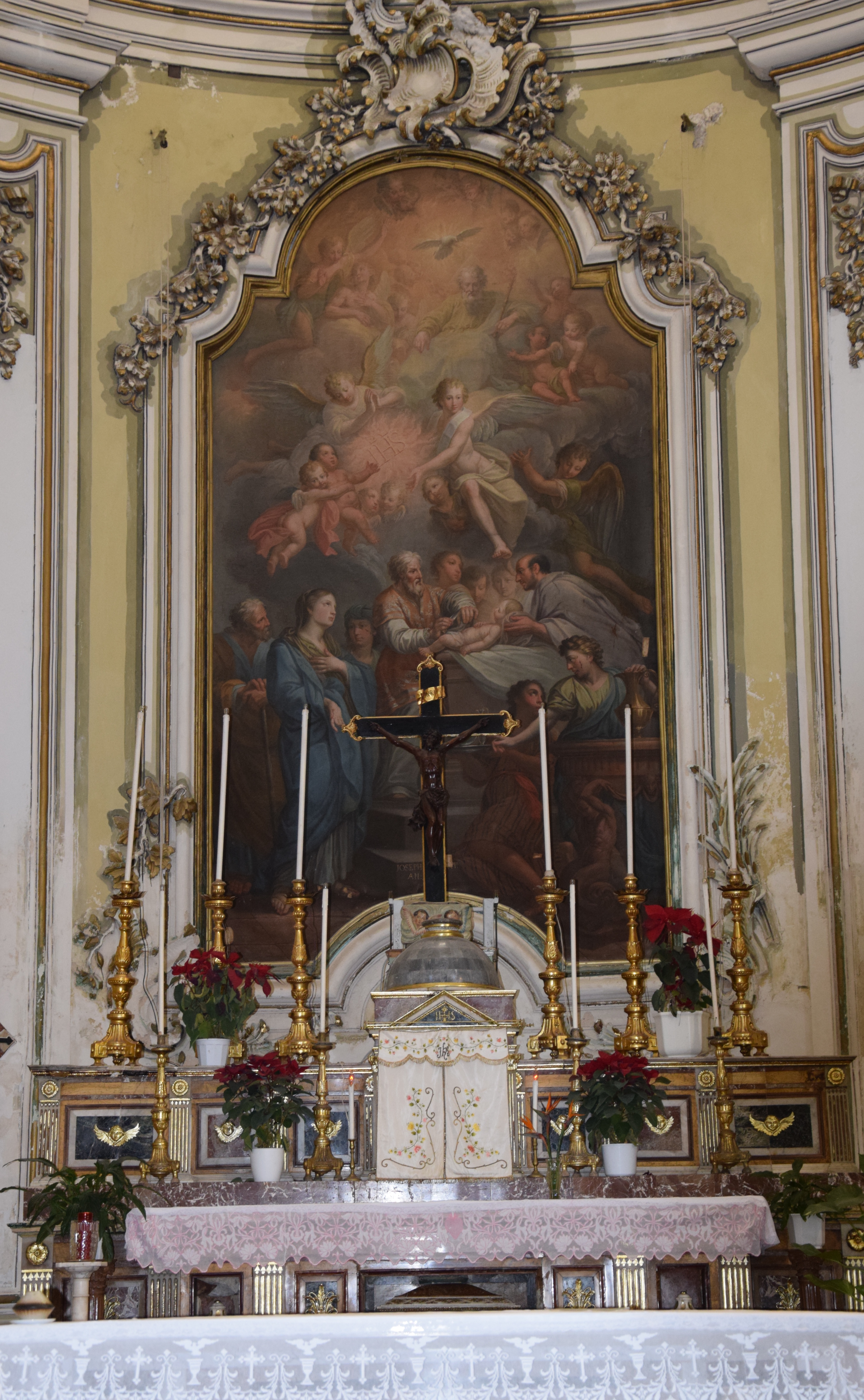 Circoncisione di Gesù, tela di Giuseppe Renda (1797)